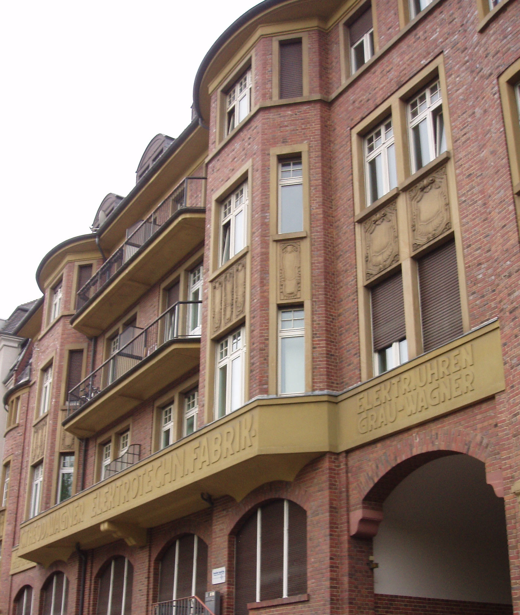 Firmengebäude von Grau-Wagner in der Schiersteiner Straße